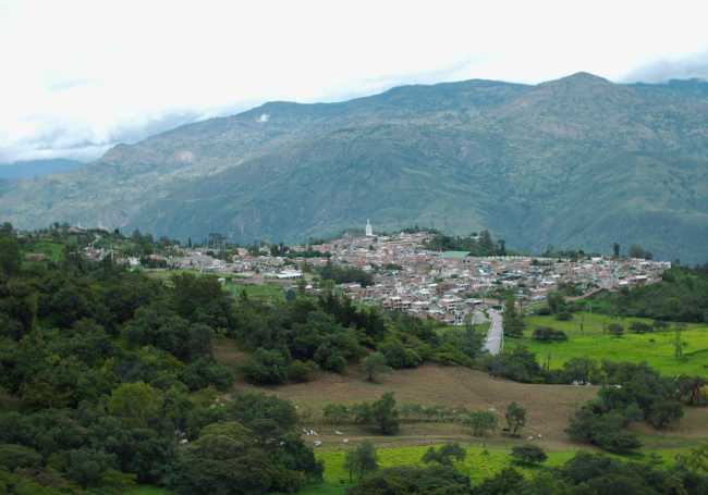 Panorámica de Soatá